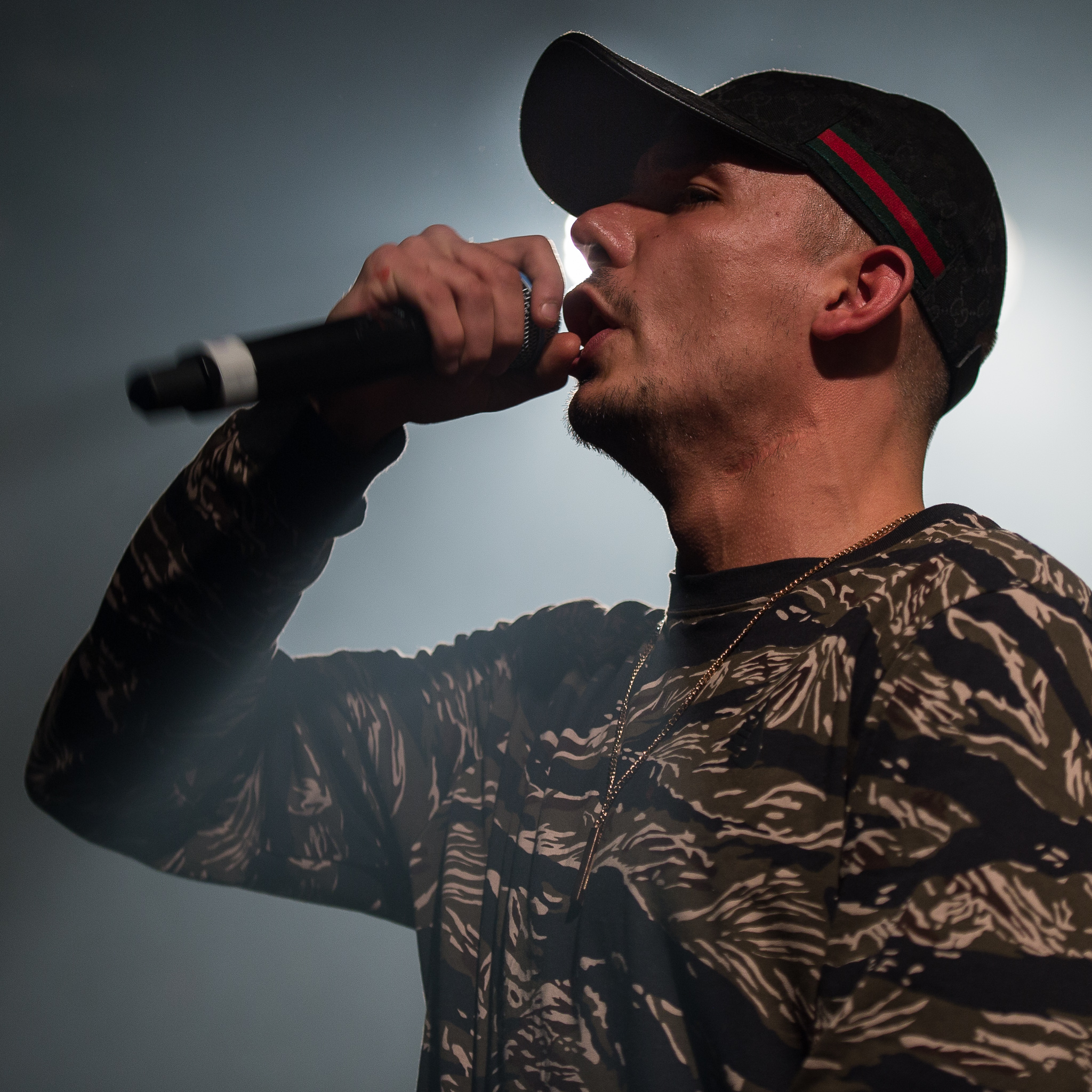 Capital Bra,Concertbüro Franken,Der Hirsch,Konzert,Livekonzert,Livemusik,Musik,Vladislav Balovatsky